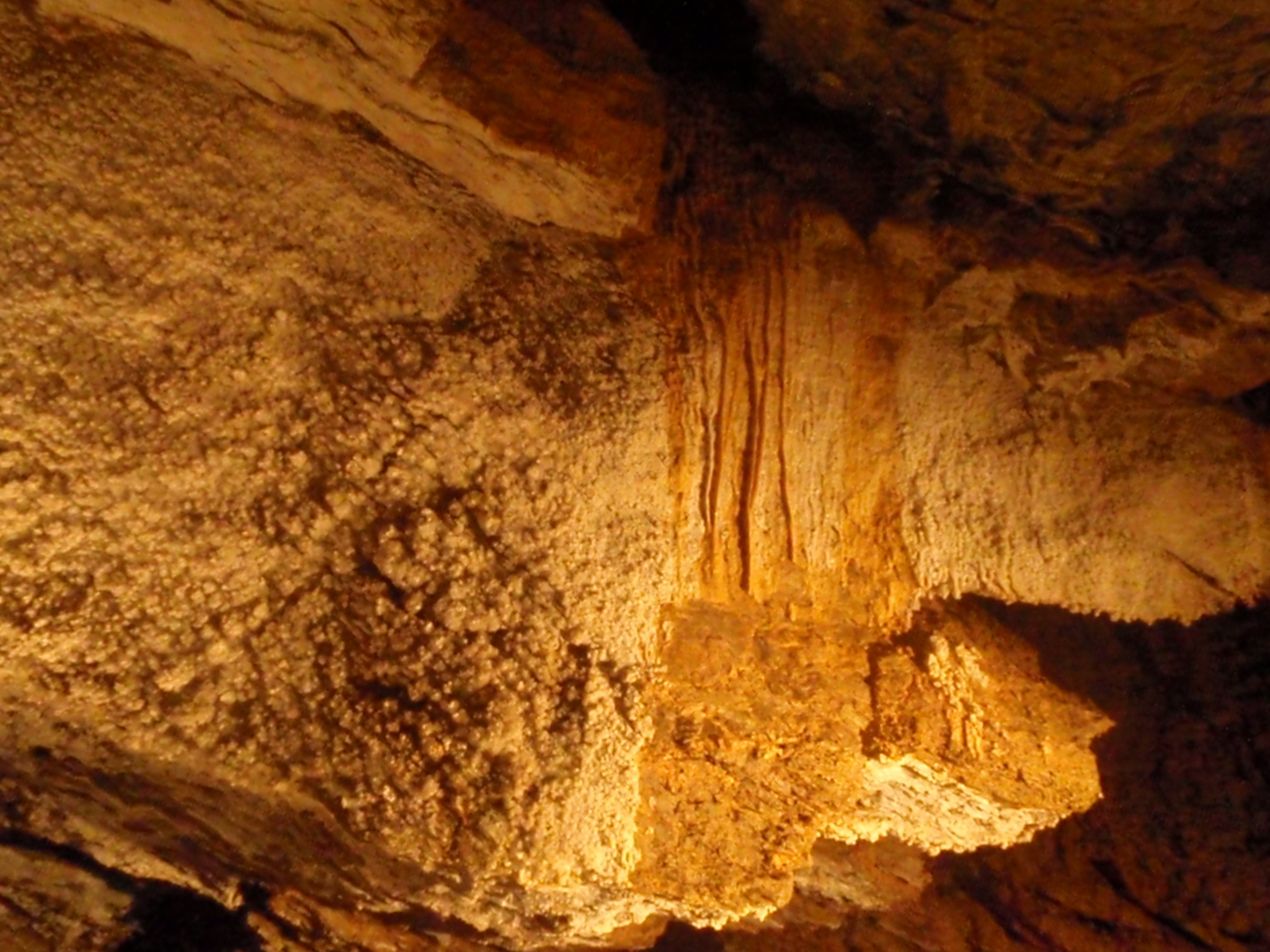 Opona